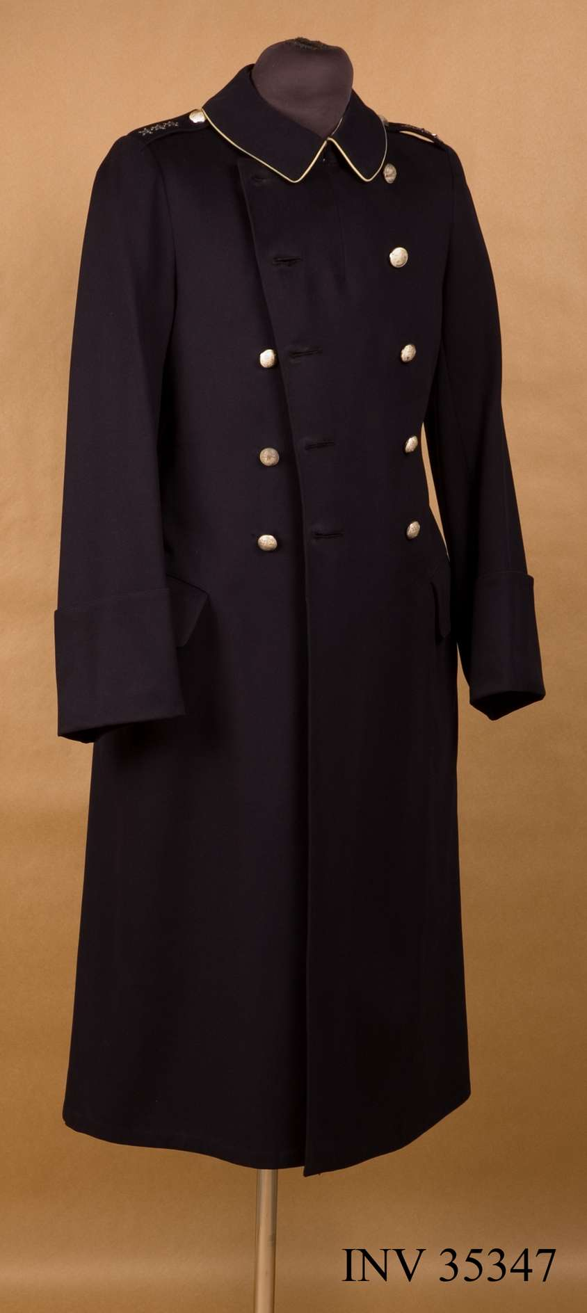 Kappa m/1886 för ryttmästare vid Livregementet till häst (K 1). Identifikationsnr: AM.035347 Samling: Armémuseum